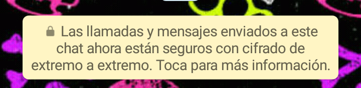 Notificación en Android sobre el cifrado de extremo a extremo al iniciar un chat.